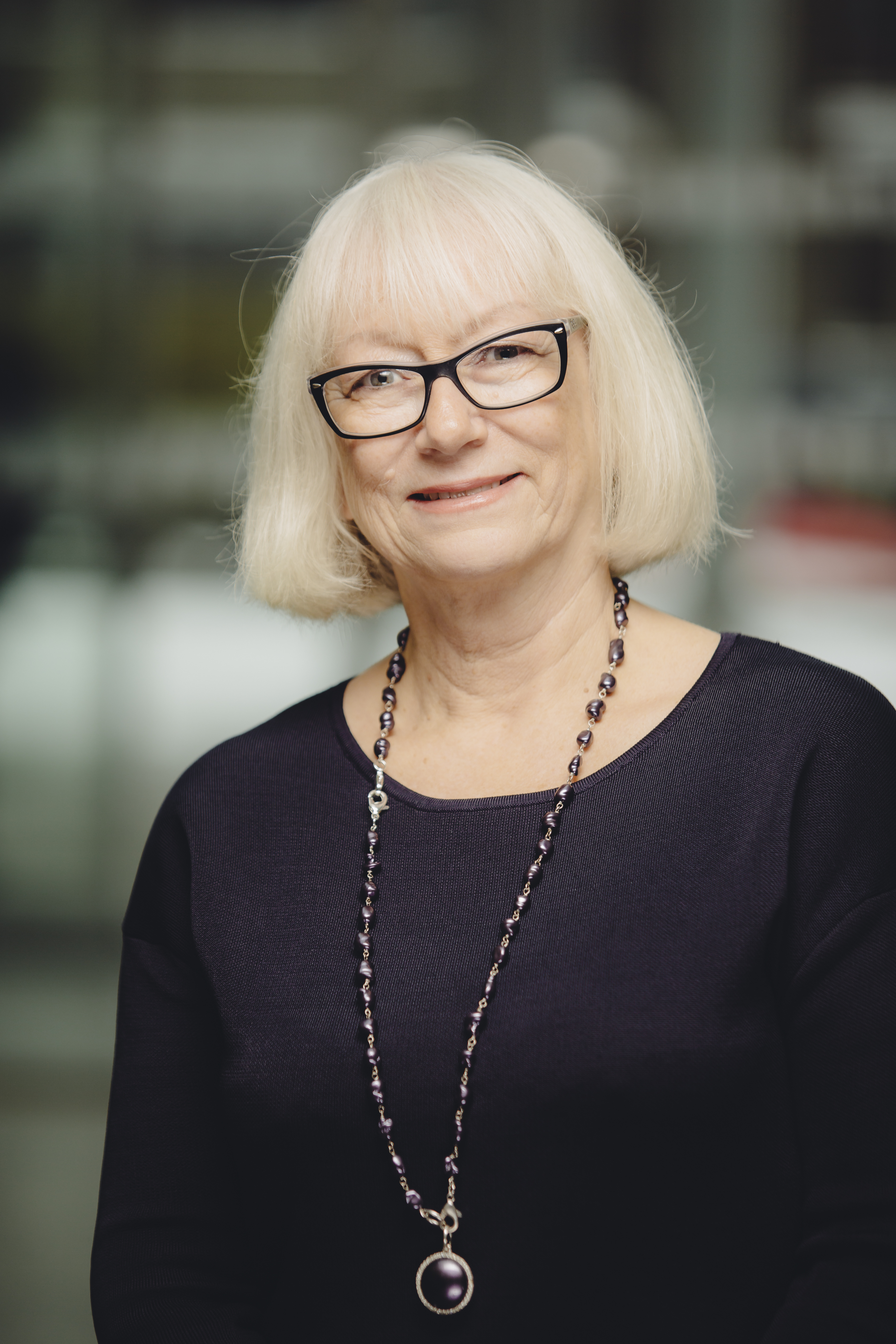 Gunhild Glosemeyer Johansen. Tromsø kommune portrettfoto